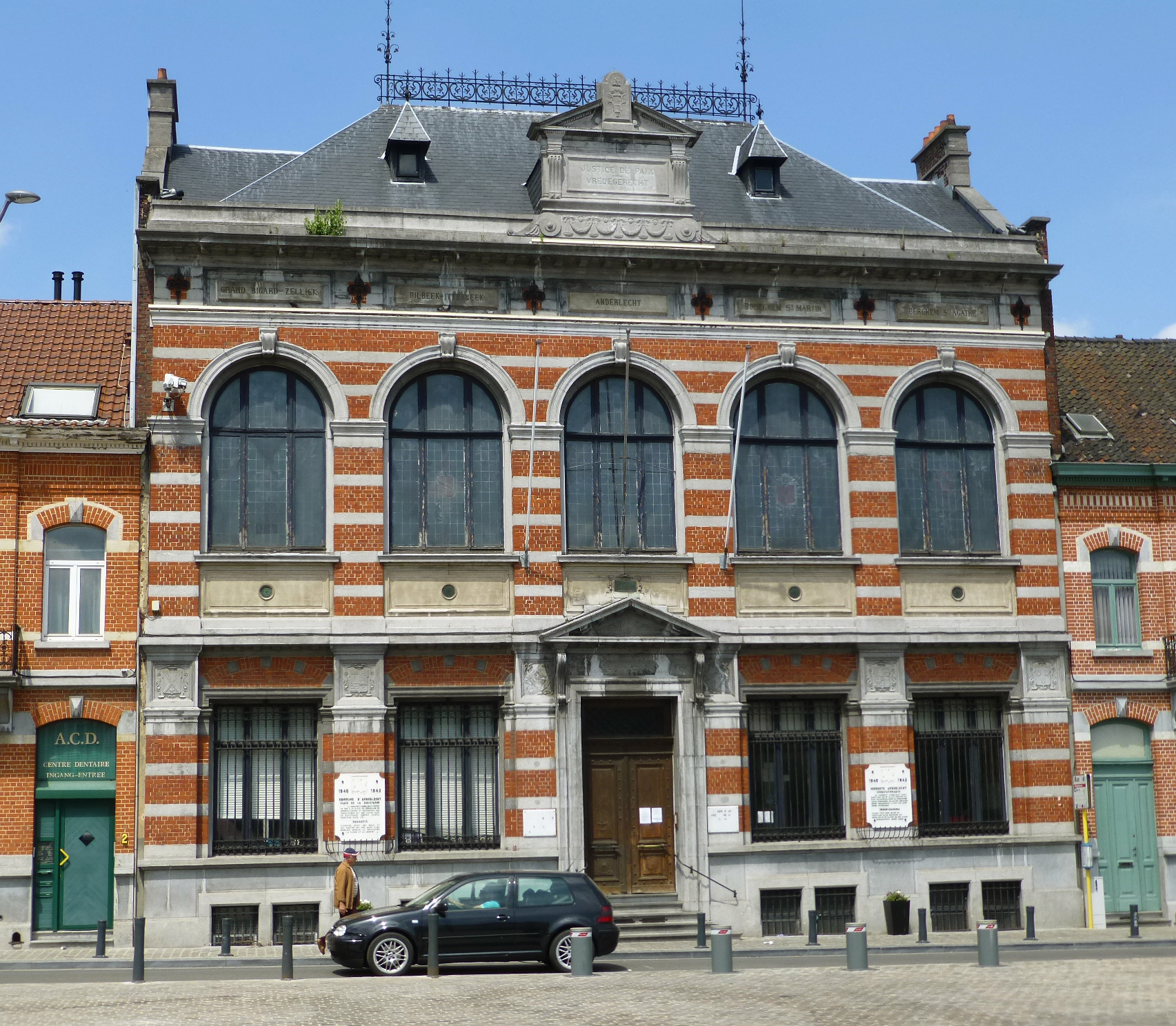 Justice de Paix d'Anderlecht, Place de la Résistance, fin 19e siècle. Les communes concernées débordent les limites actuelles de Bruxelles (inscrites sous le toit).